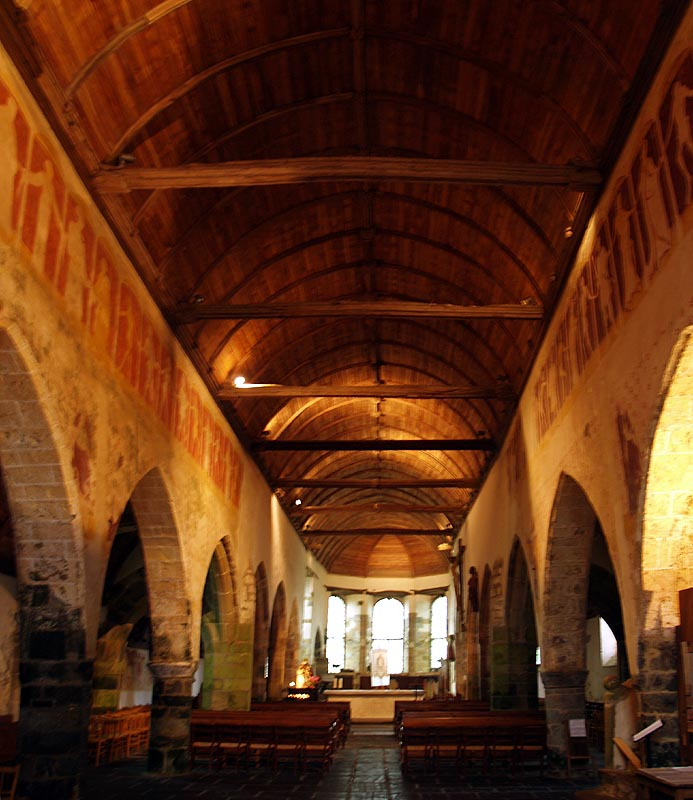 Chapelle Kermaria an Iskuit, commune de Plouha, Côtes-d'Armor (22), France. La nef.